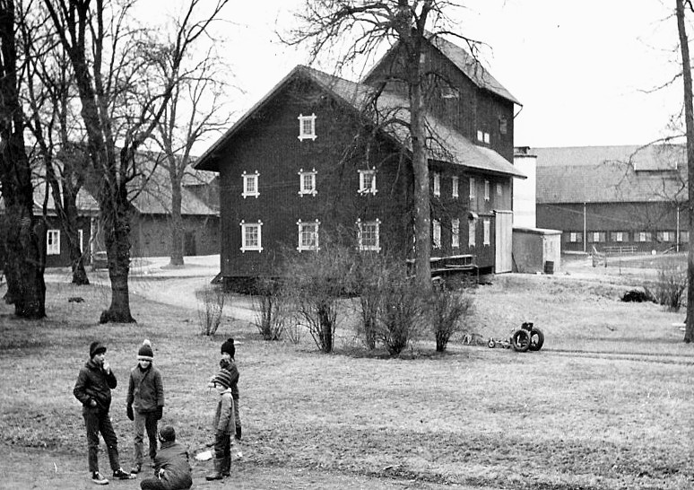 Väderbrunns gård, Bergshammar